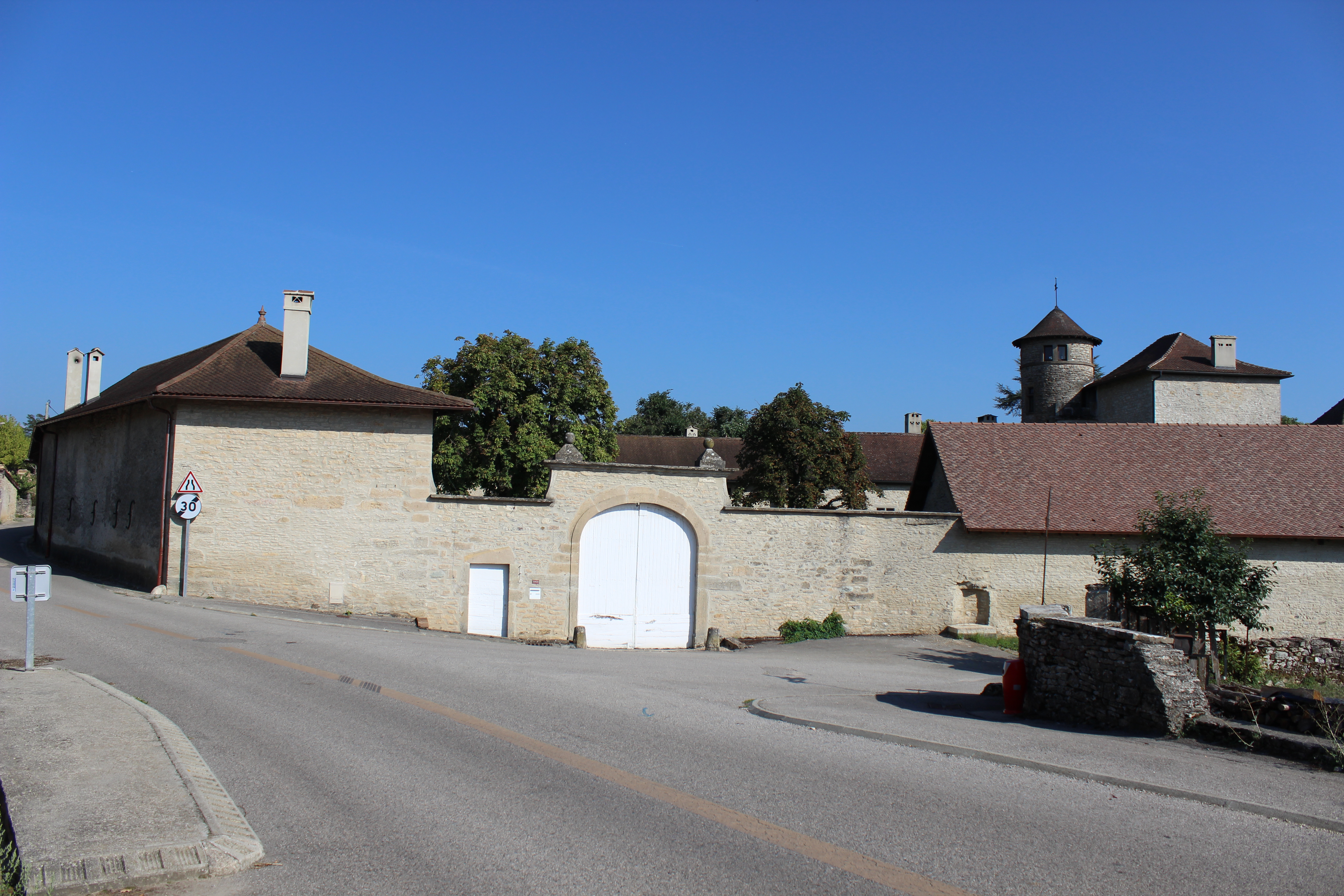 Château à Moras.